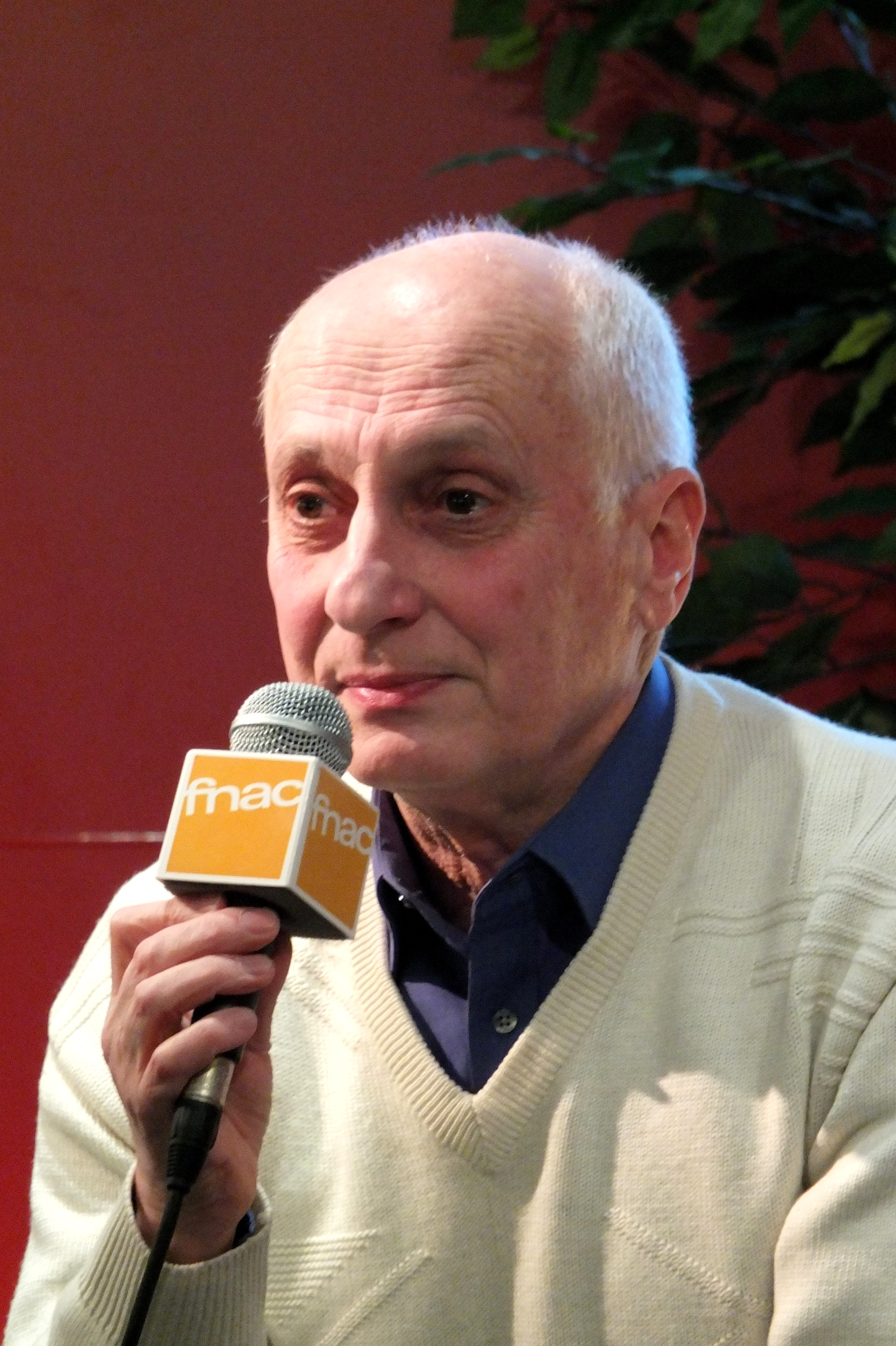 Michel Ocelot, lors de la présentation du DVD de Kirikou et les hommes et les femmes, le 16 février 2013 à la FNAC des Ternes (Paris 17e arrond.).